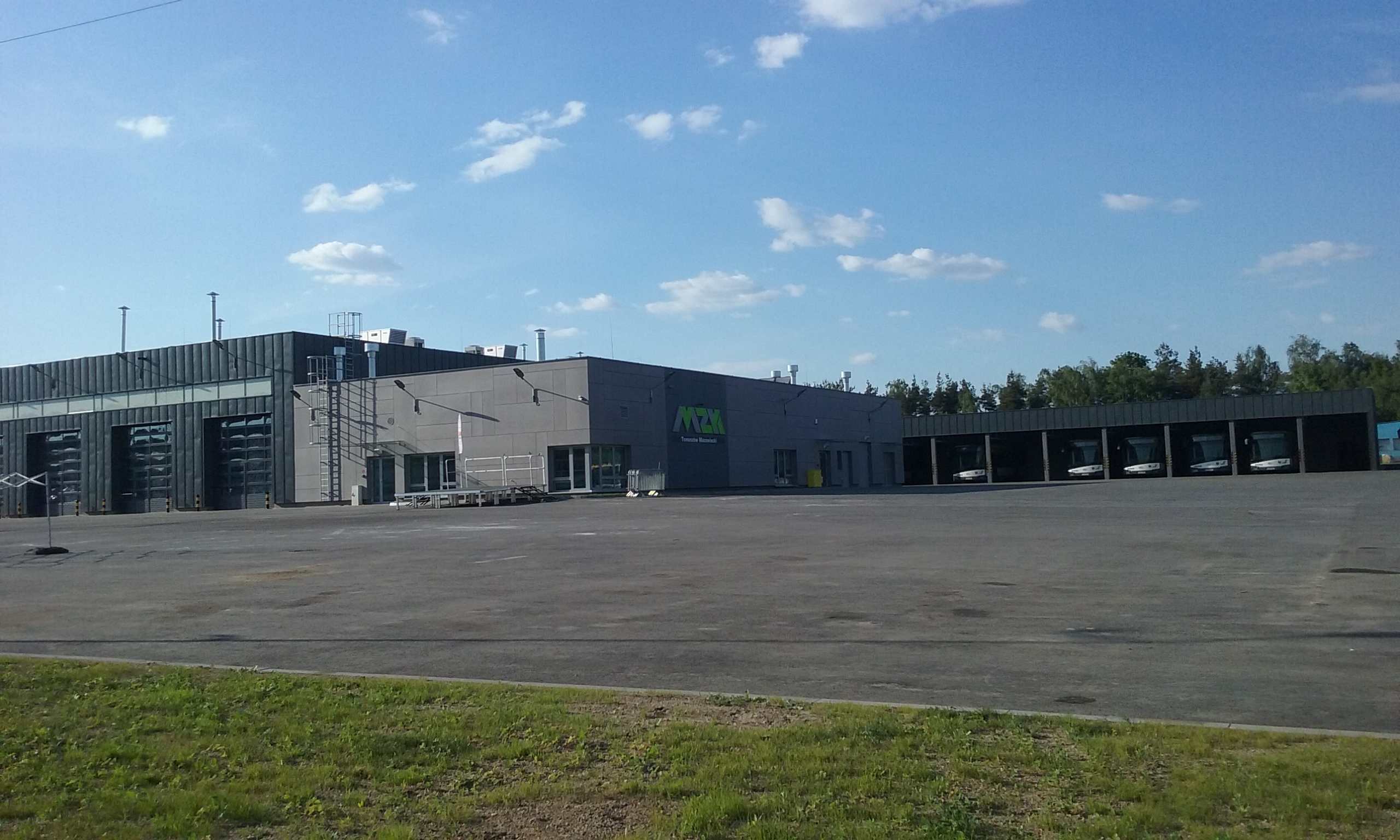 Nowa baza Miejskiego Zakładu Komunikacyjnego w Tomaszowie Mazowieckim, 13 maja 2018 roku